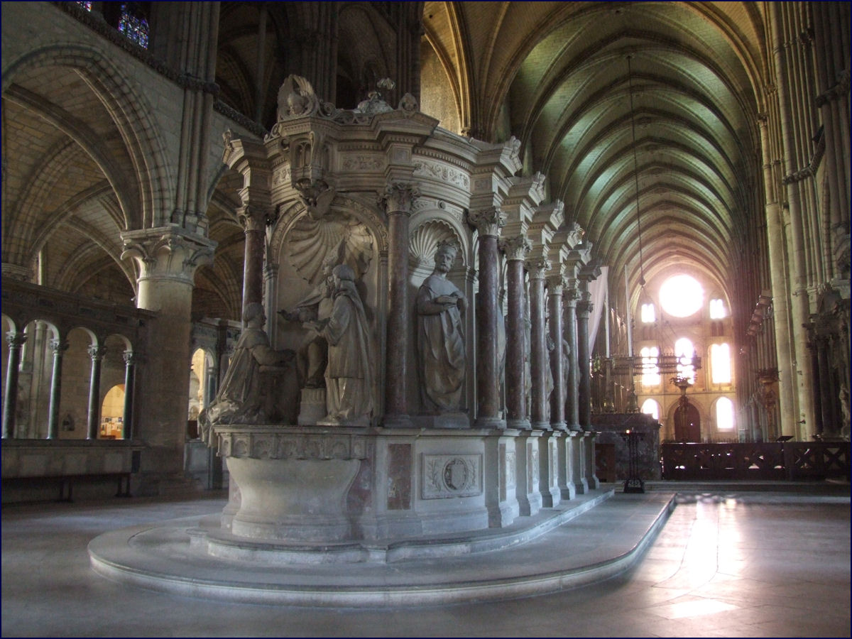 Basilique Saint-Remi (Basilica St. Remigius), tombeau refait en 1847 avec les statues du XVIIème siècle, vue est et nord, Reims, France